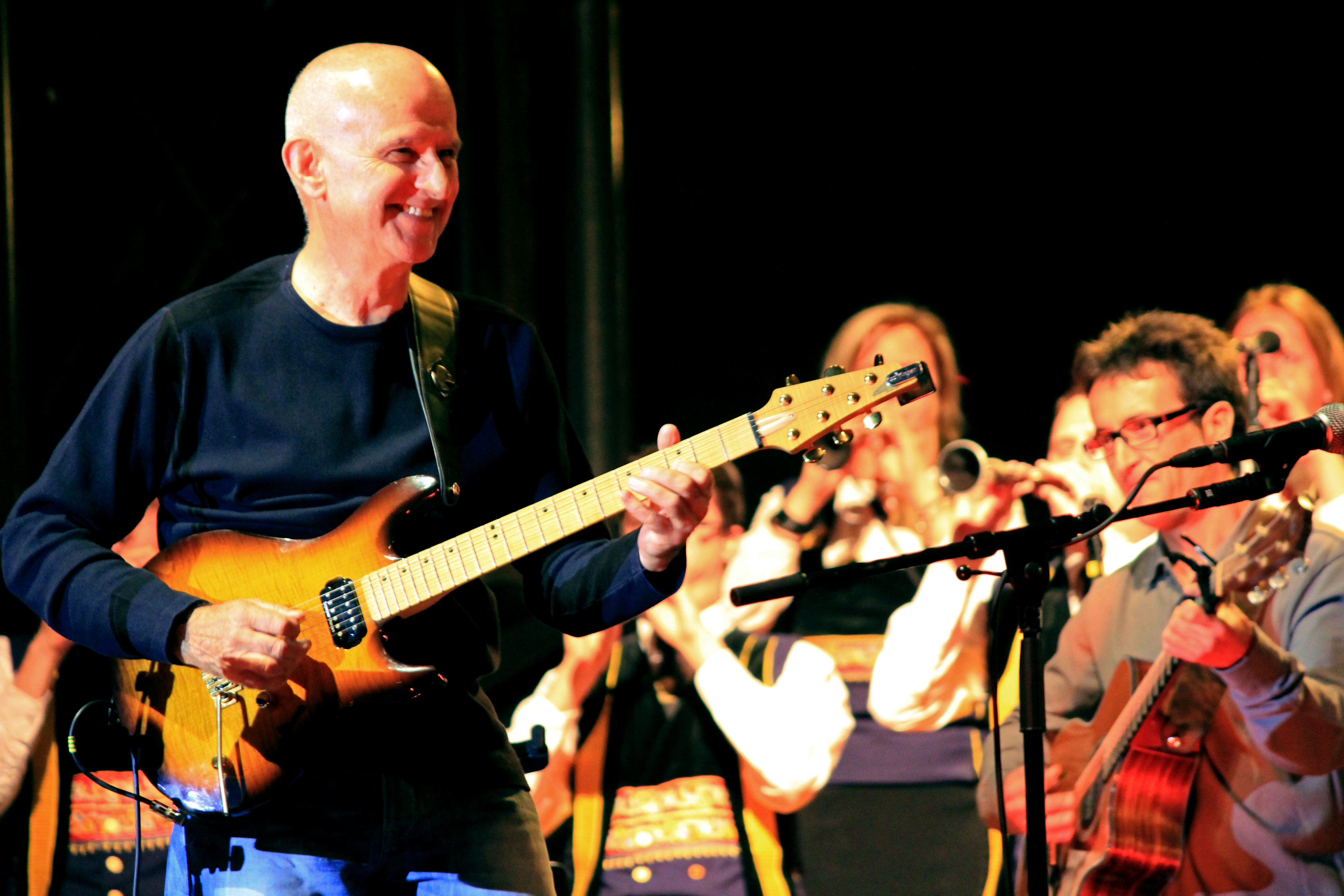 Dan Ar Braz et le Bagad Kemper lors du concert inaugural de la tournée liée à la promotion de l'album Celebration, lors du Festival Interceltique de Lorient 2012.